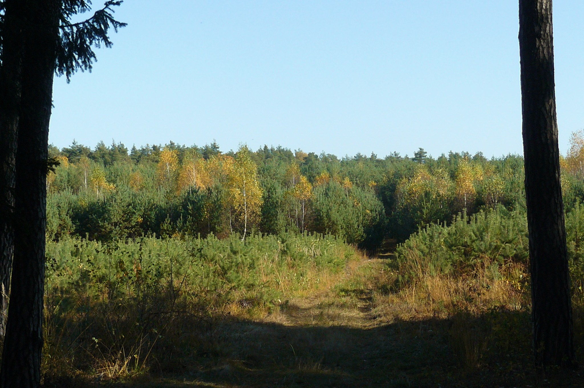 Obszar Chronionego Krajobrazu Dąbrowy Krotoszyńskie i Baszków-Rochy - krajobrazy leśne kompleksu Baszków-Rochy.